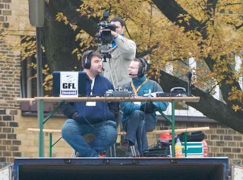 GFL-Radio Team beim Relegationsspiel der MG Mavericks vs. HH Blue Devils